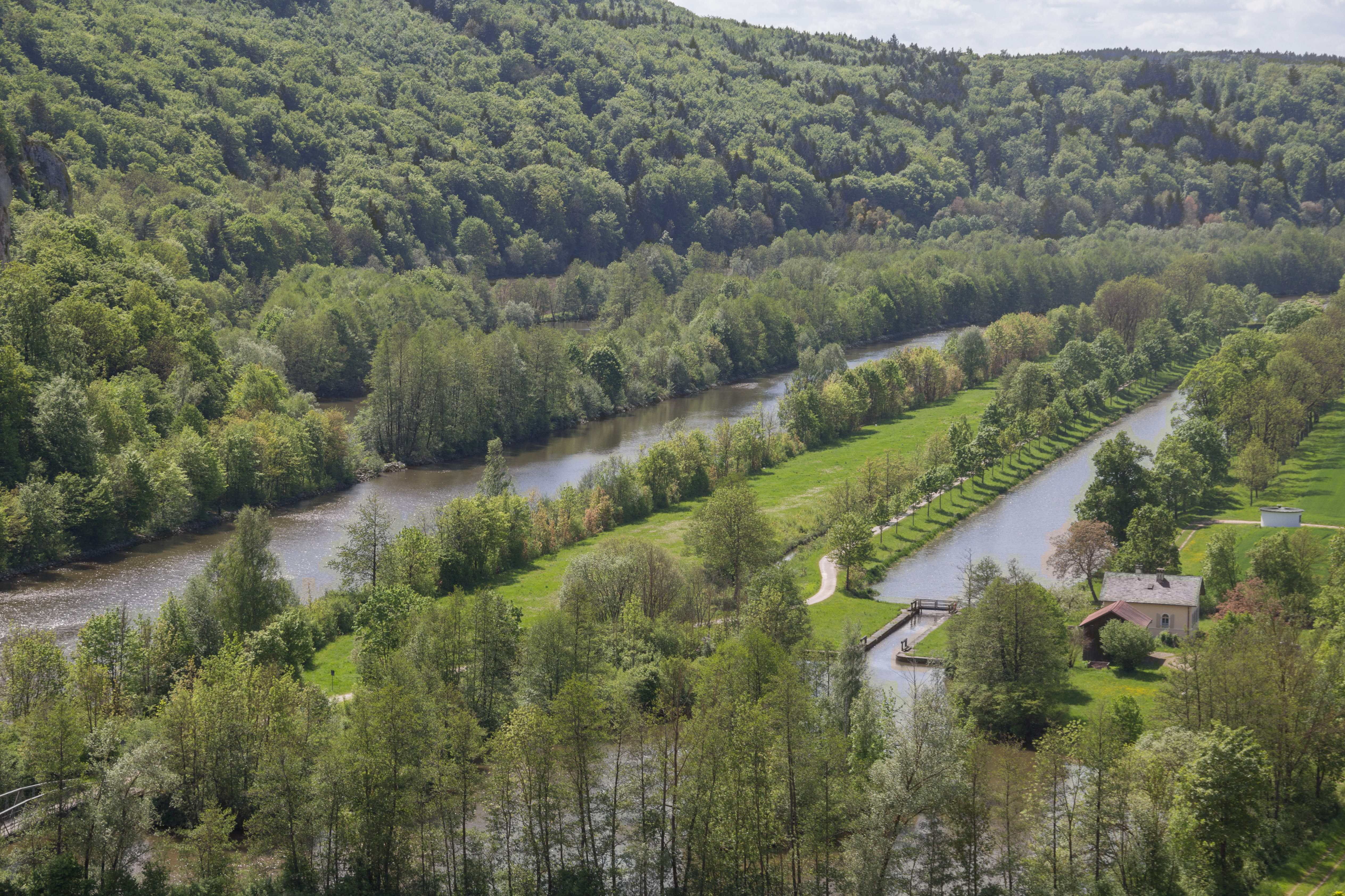 Schulerloch, Naturschutzgebiet, Essing, Altmühl